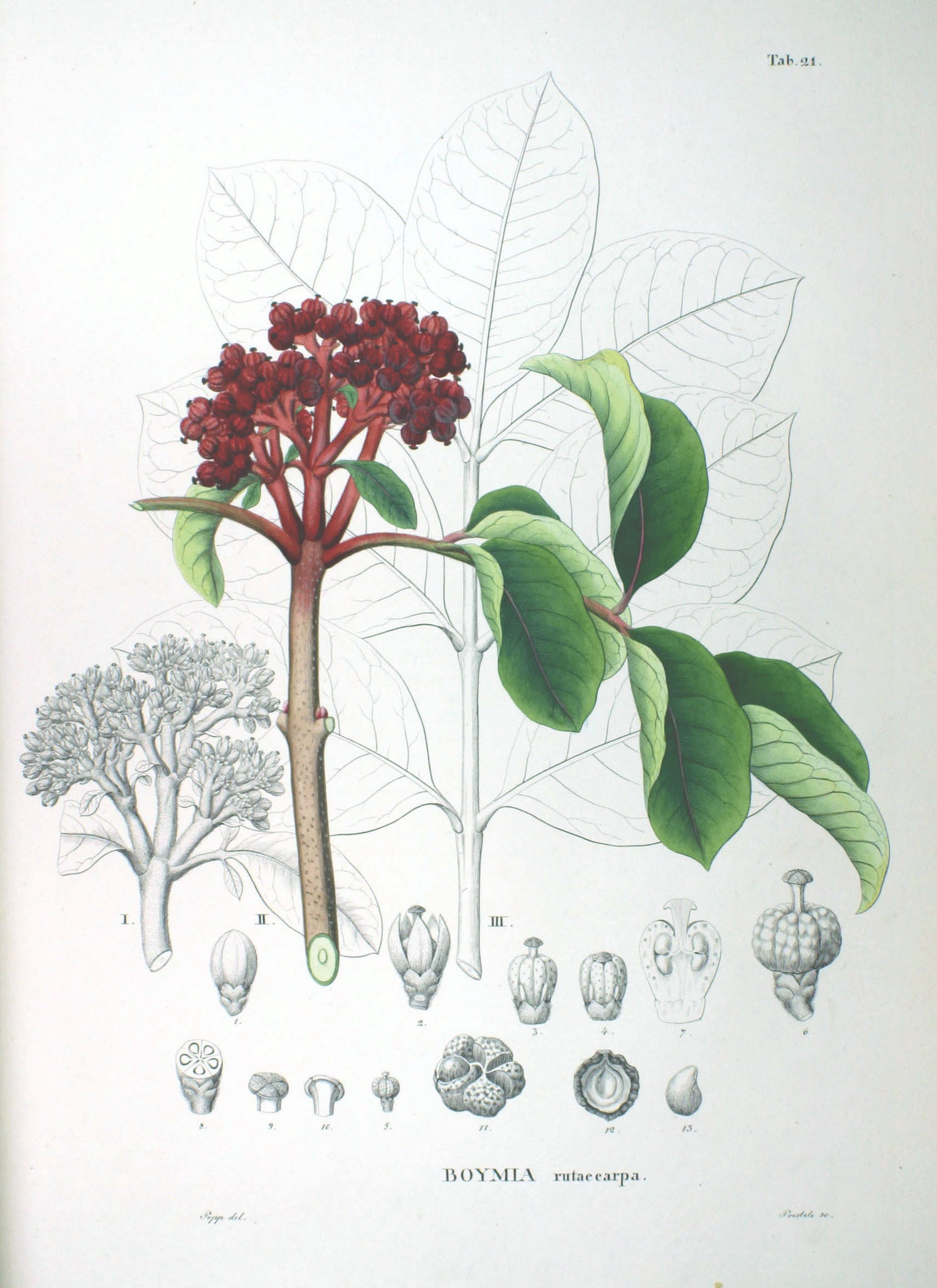 Tetradium ruticarpum (syn. Evodia rutaecarpa per USDA ARS/GRIN) Plate from book